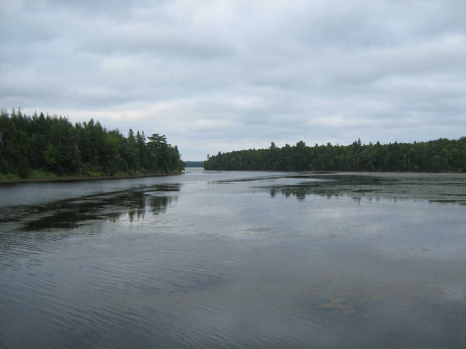 Rivière Kouchibouguac dans le parc national de Kouchibouguac